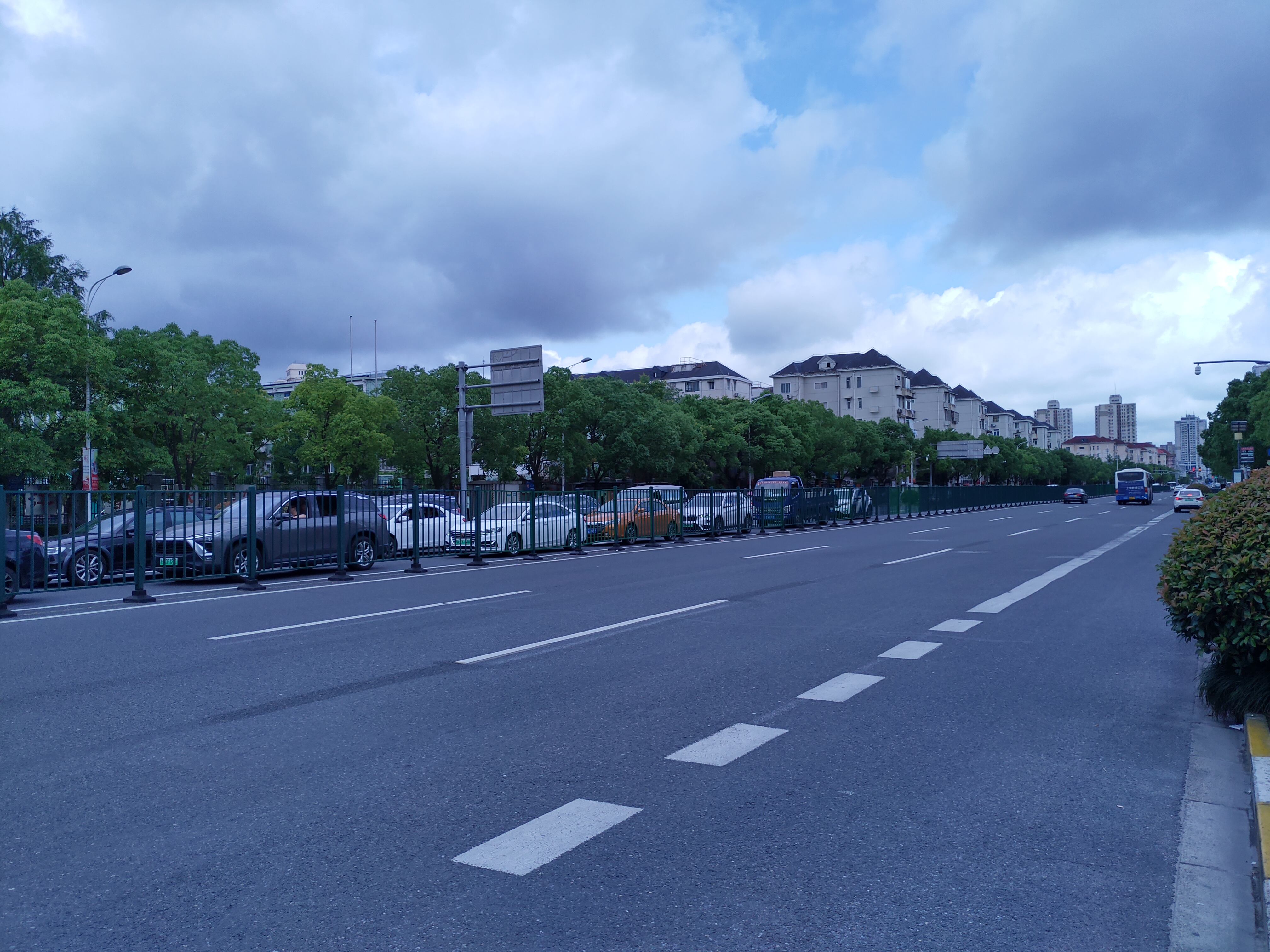 Shangnan Road上南路，Shanghai上海,Jun 2020